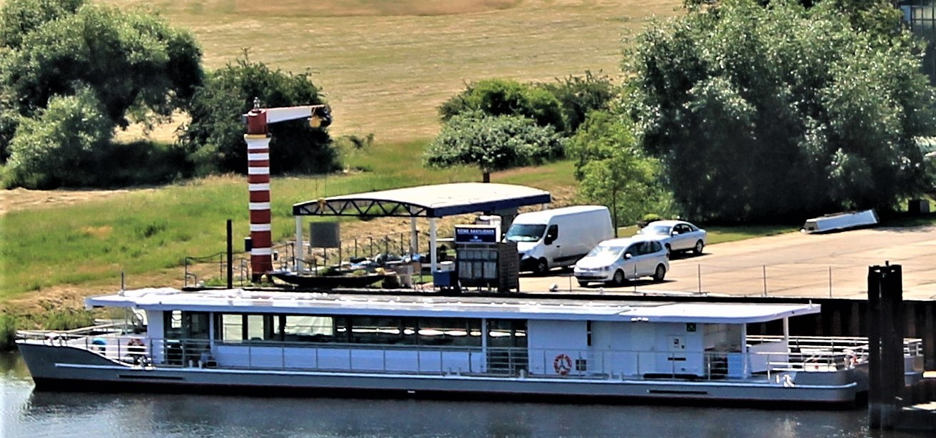 Blick auf die Suncat 120